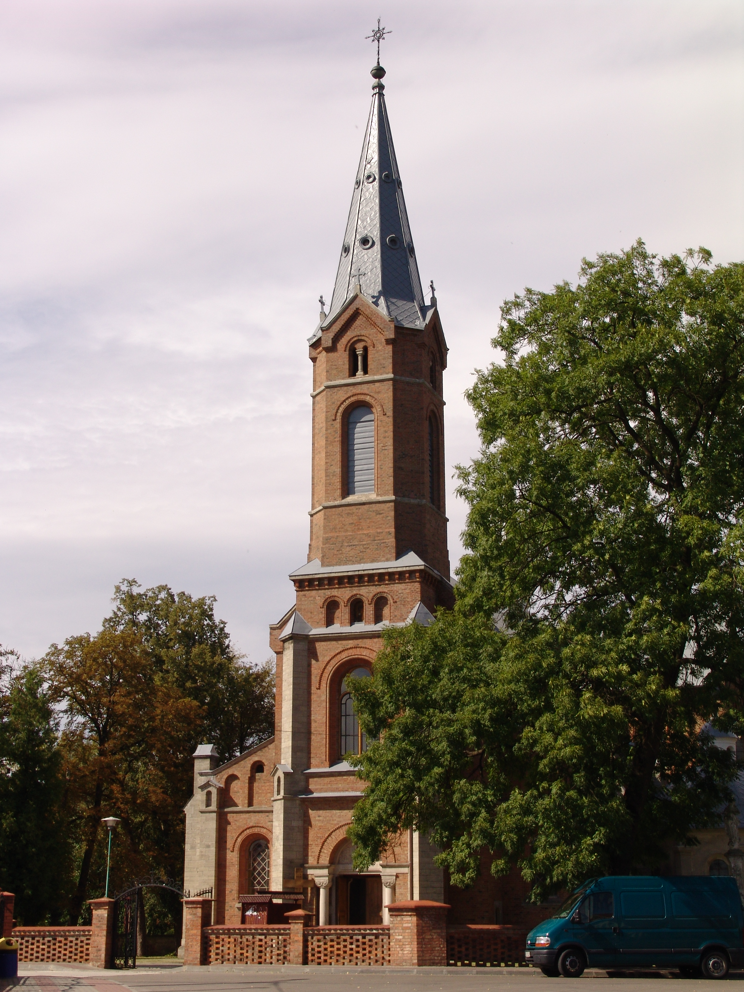 Połaniec - kościół par. p.w. św. Marcina (widok od południowej strony - frontu)